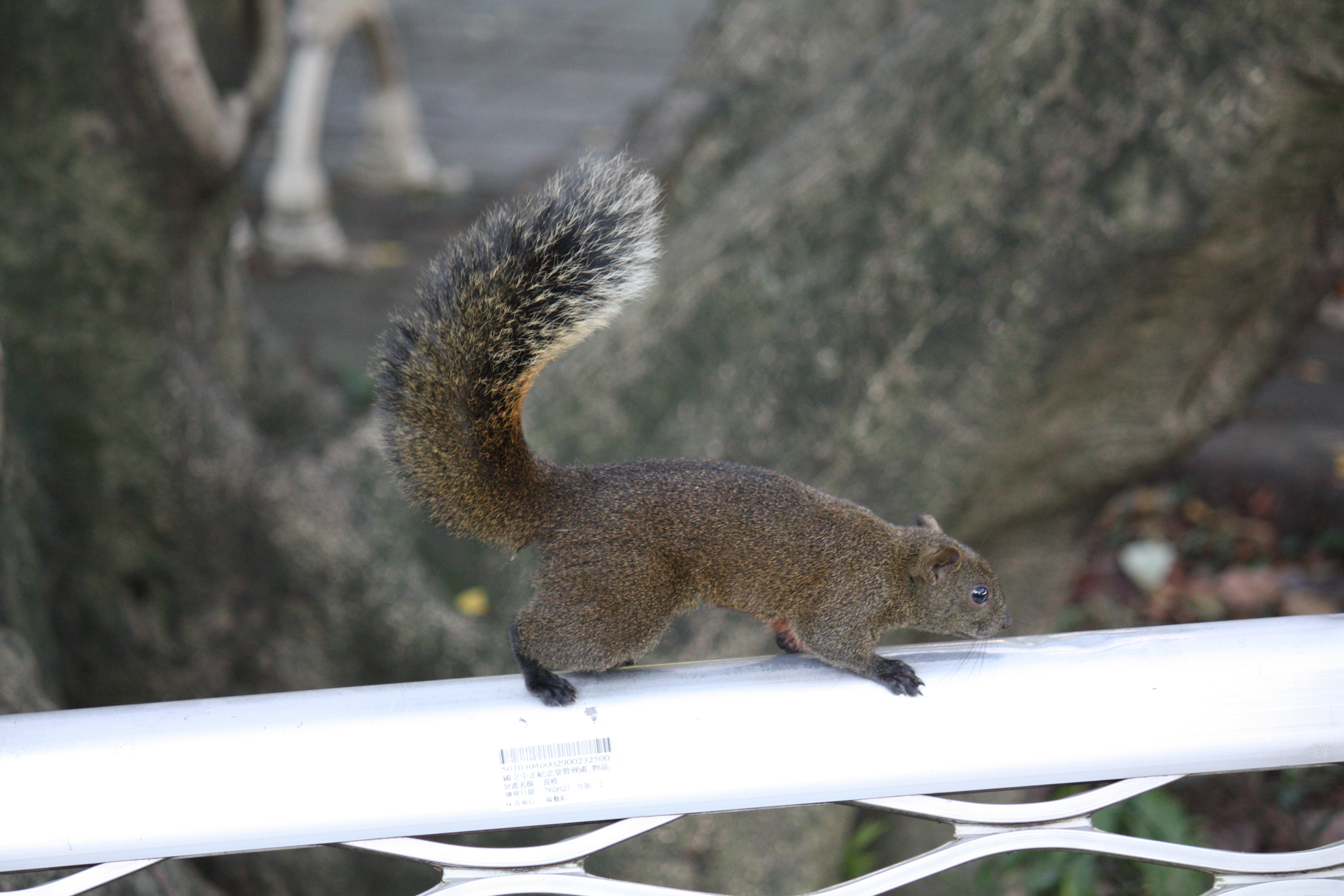 Ein Pallas-Hörnchen im Park von Taipeh, Taiwan